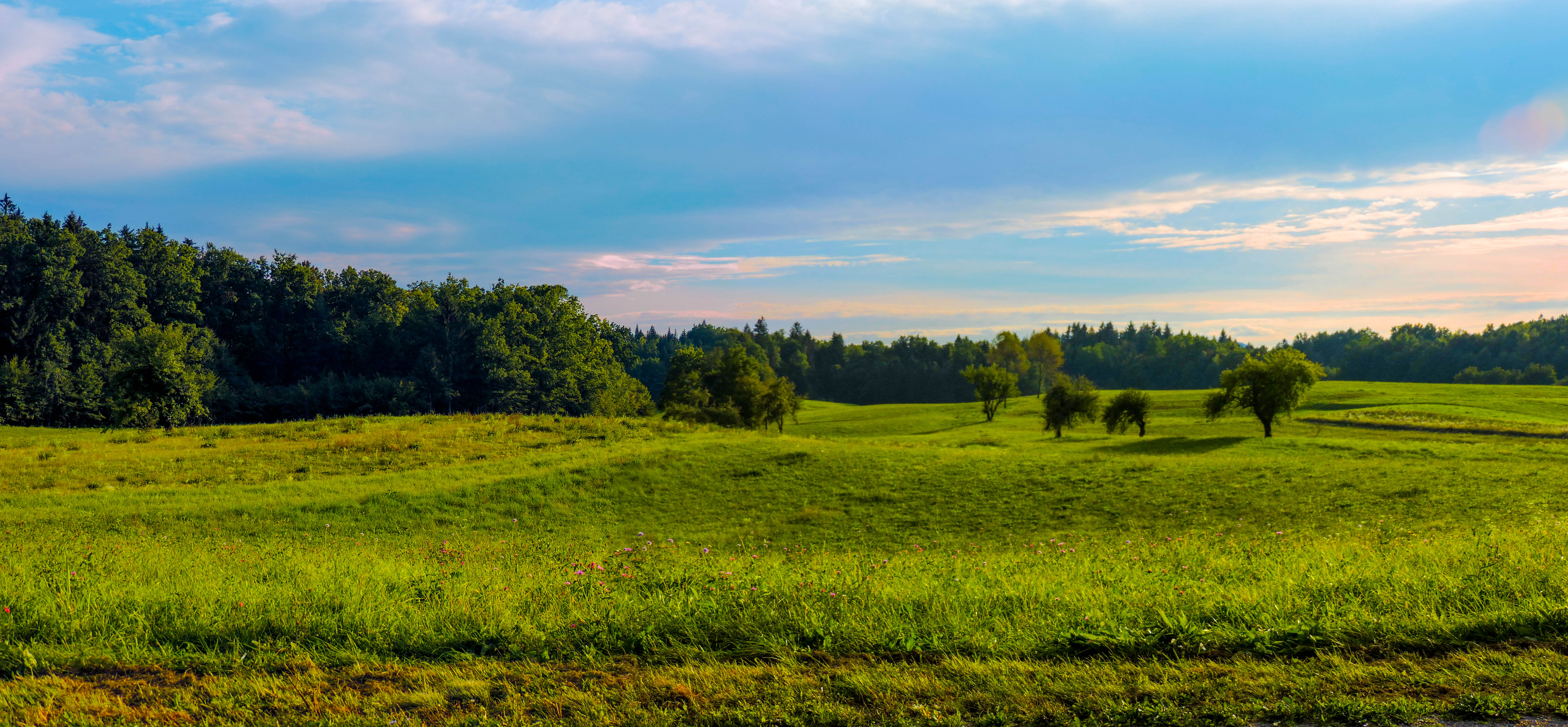 Green plains and apple trees